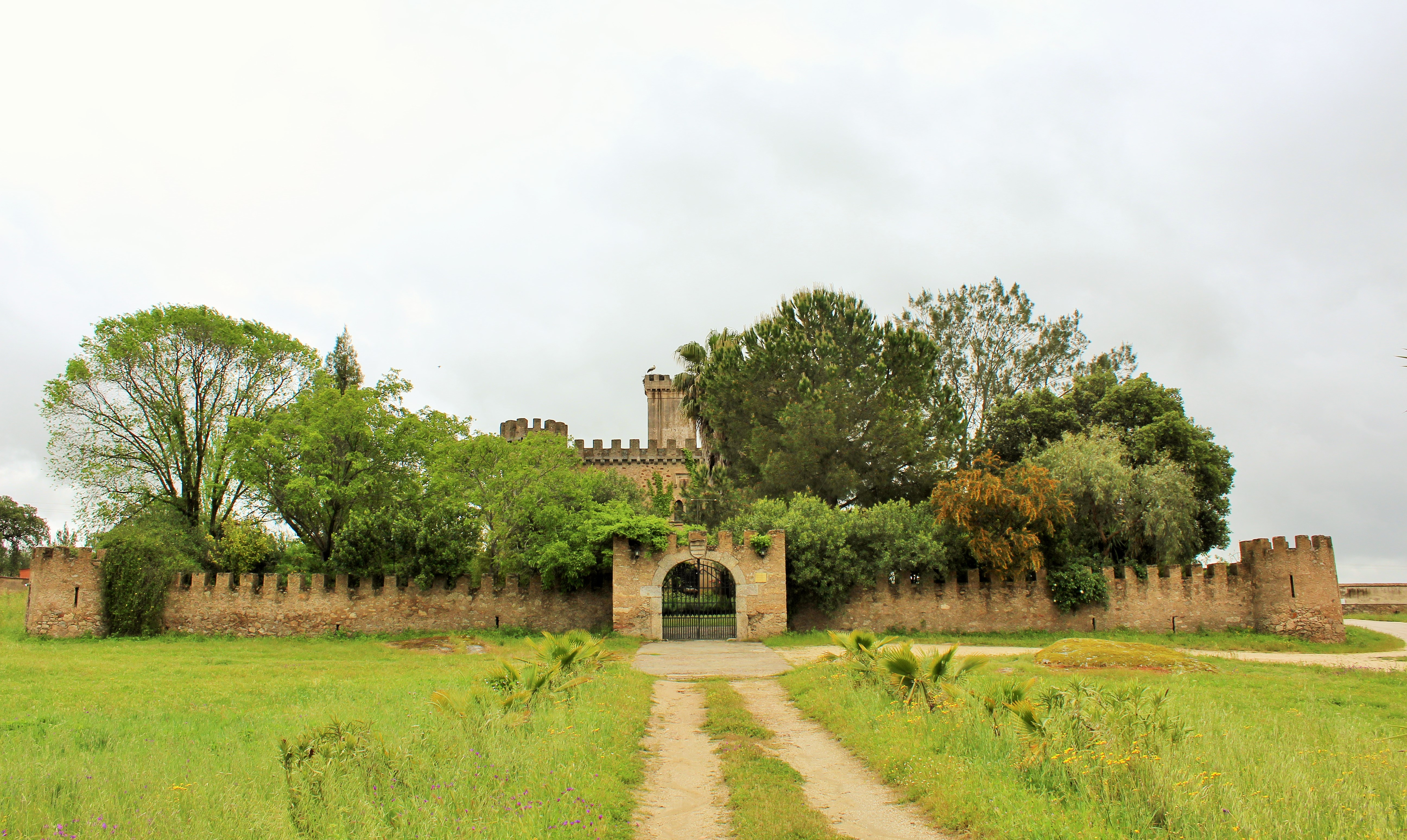 Castillo convertido en lugar de eventos. A unos 10 km. de Cáceres